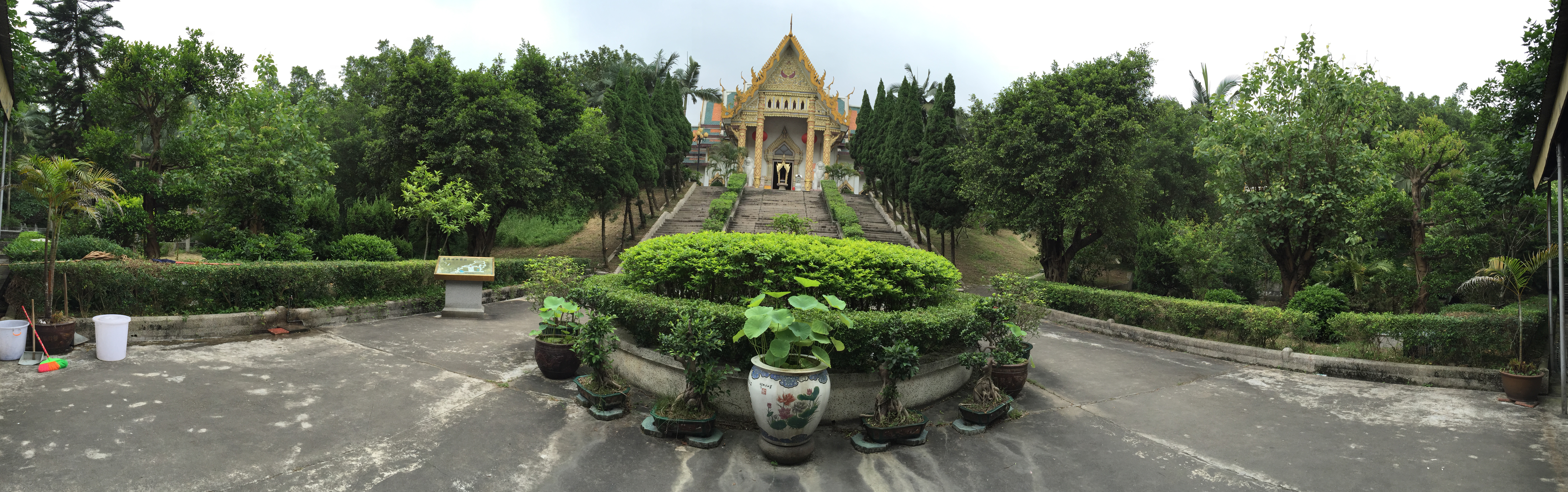 中文（中国大陆）: 潮州开元寺泰佛殿全景